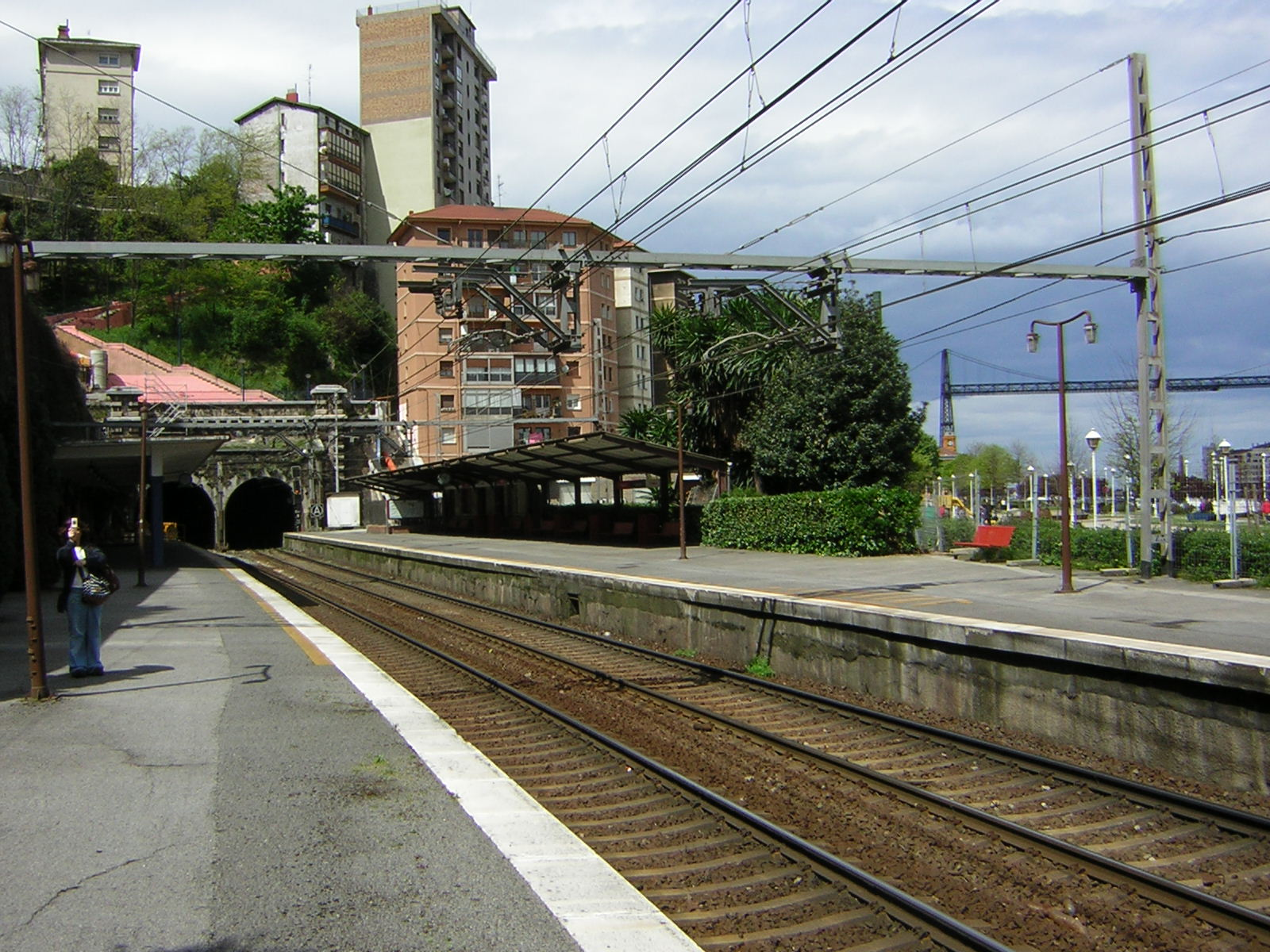 Portugalete railway station. Bilbao (Spain)